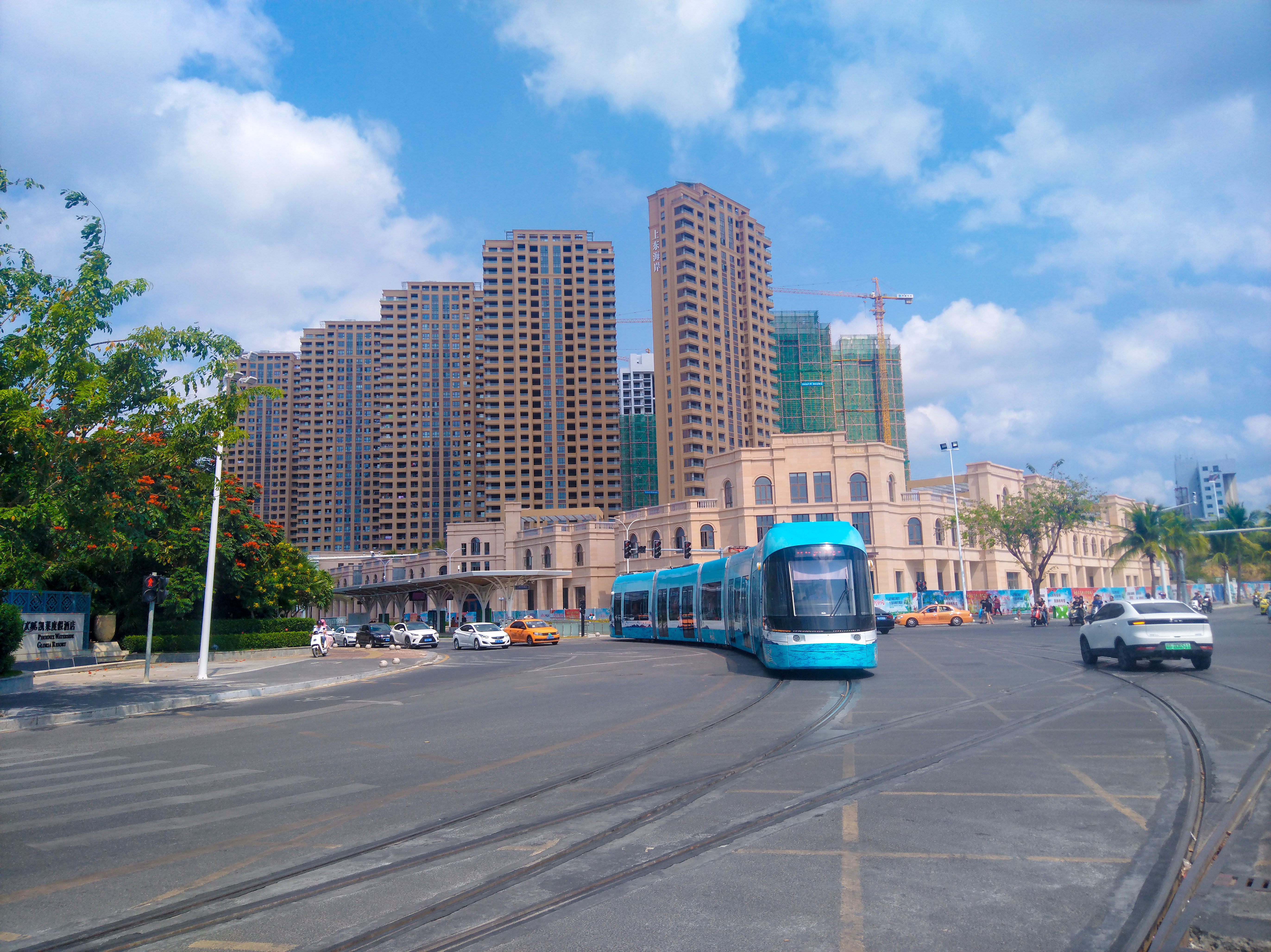 三亚有轨电车的一列车辆自三亚河东路站驶入金鸡岭路